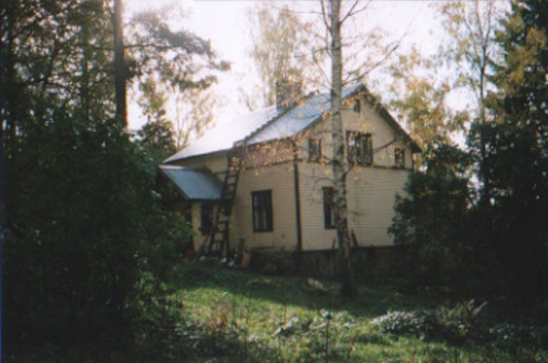 Siperia